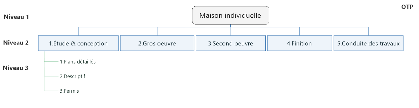 Exemple d'Organigramme des Tâches du Projet (OTP) pour un projet de construction (élaboration progressive).